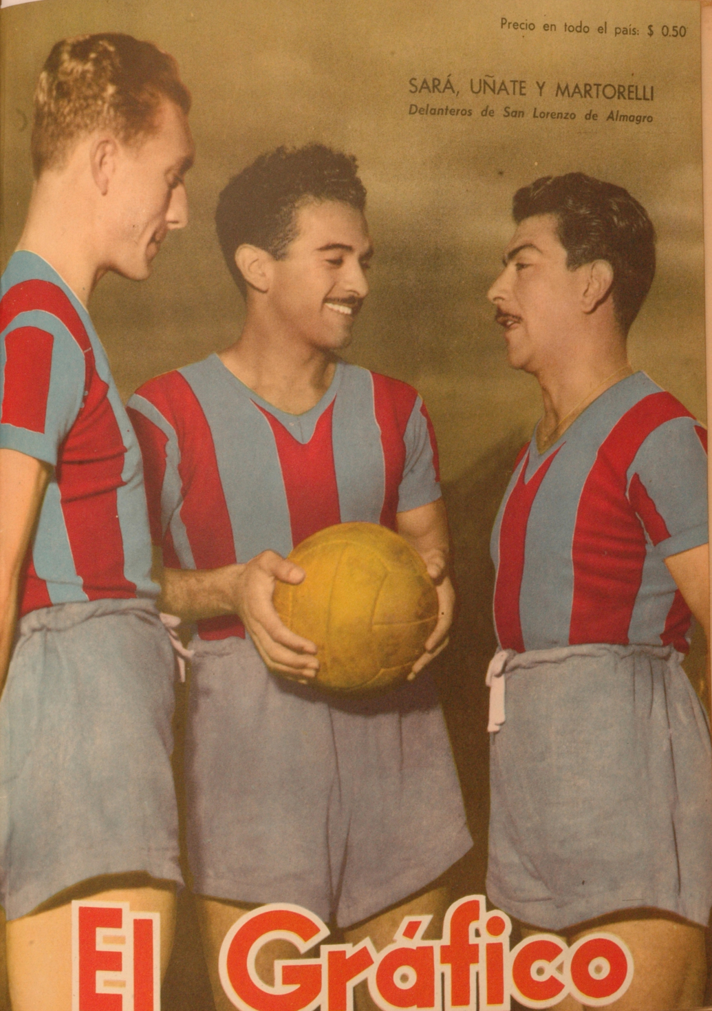 El Grafico del 24 de Junio de 1949. Edicion 1559